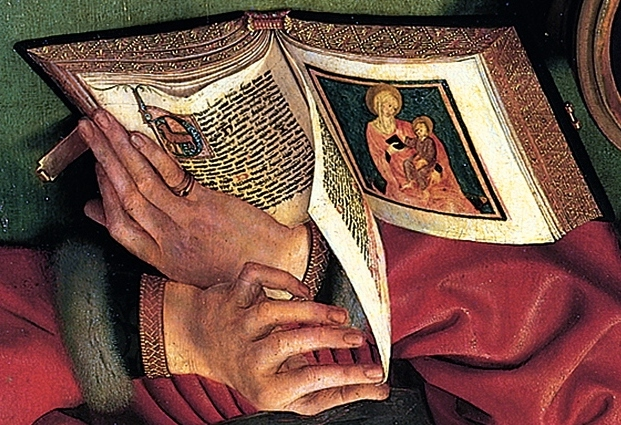 détail du "Prêteur et sa femme" de Quentin Metsys